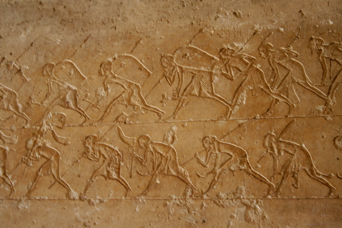 Tombes nord d'Amarna - Relief de tombe